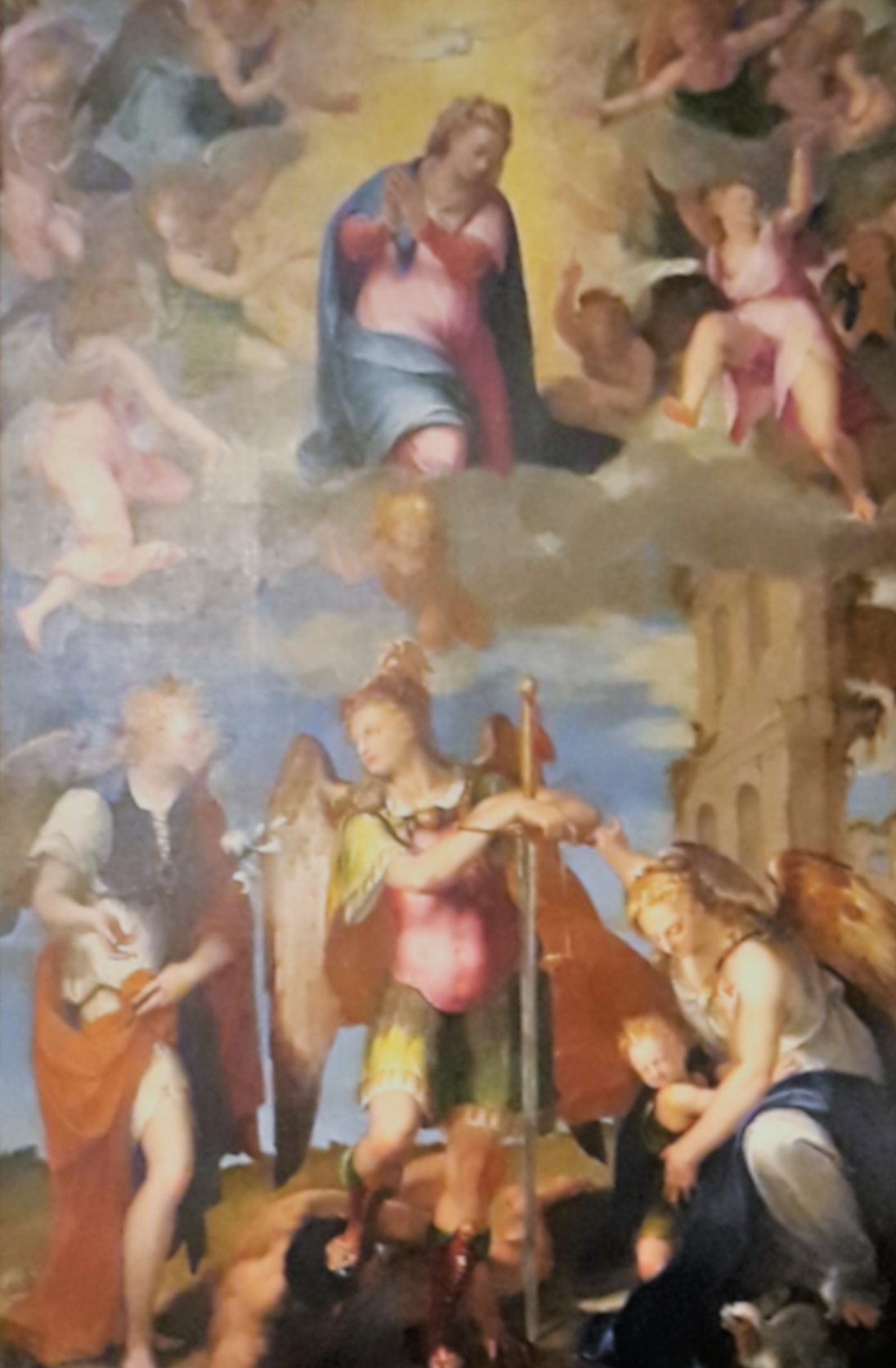 Felice Riccio, detto Brusasorci. "I Tre Arcangeli" tela presso altare laterale della chiesa di San Giorgio in Braida a Verona